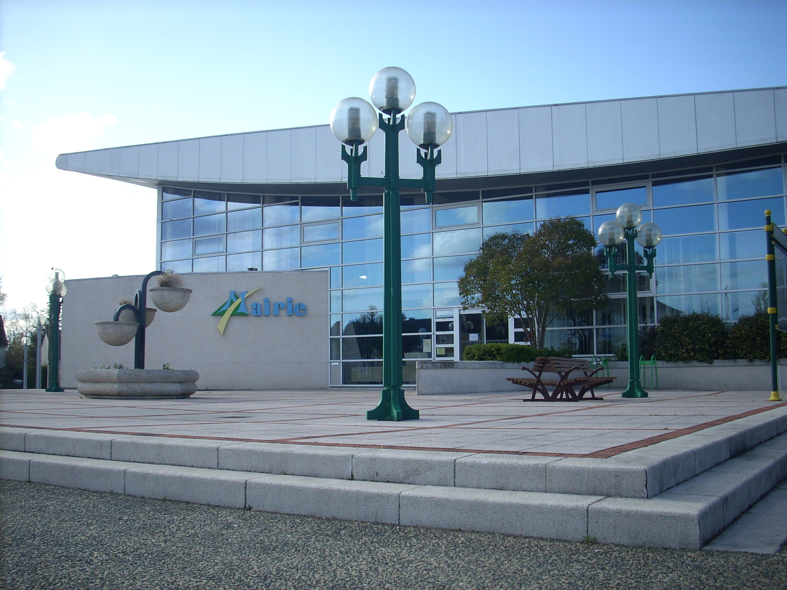 Mairie de Mulsanne